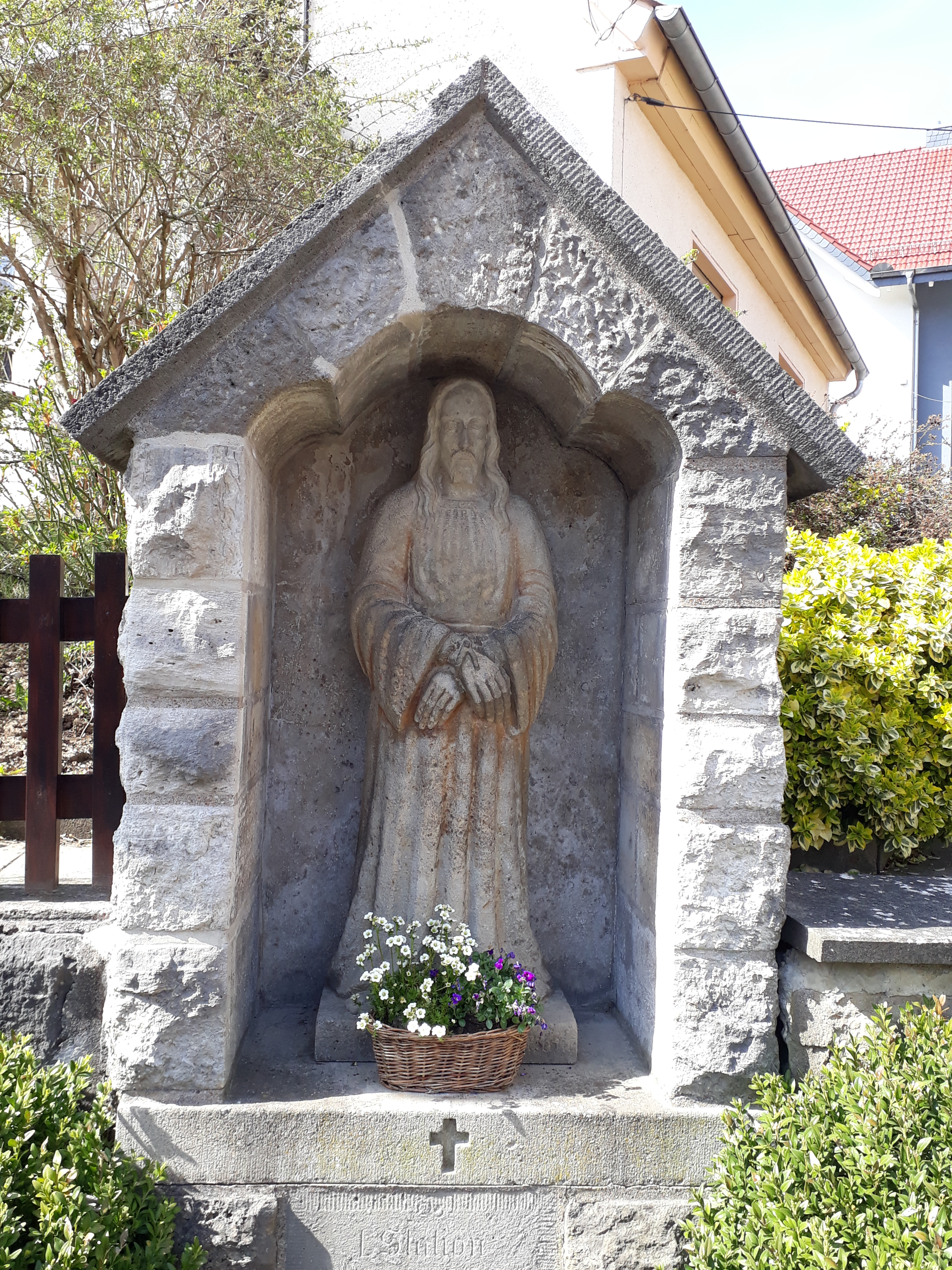 1. Station - Kreuzweg in Wendehausen